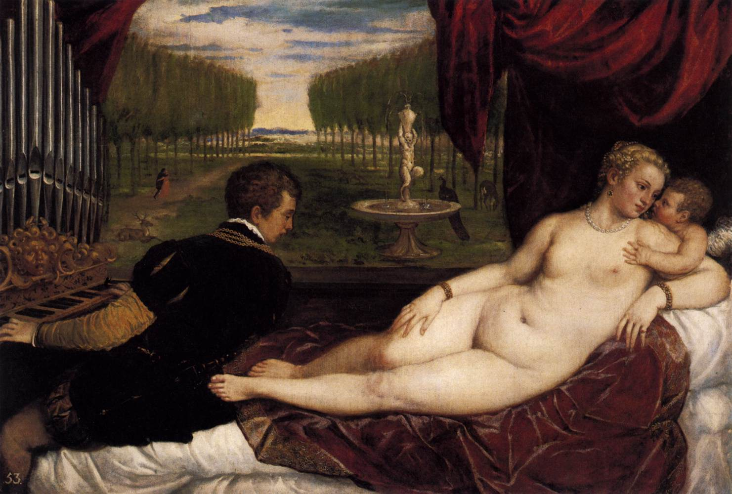 La obra representa a la diosa Venus recostada en un lecho y acariciando un perro al tiempo que escucha al caballero que toca el piano y que la observa.